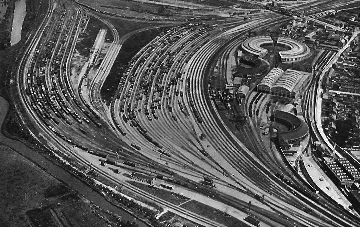 Depot de longueau avant la guerre de 1939.